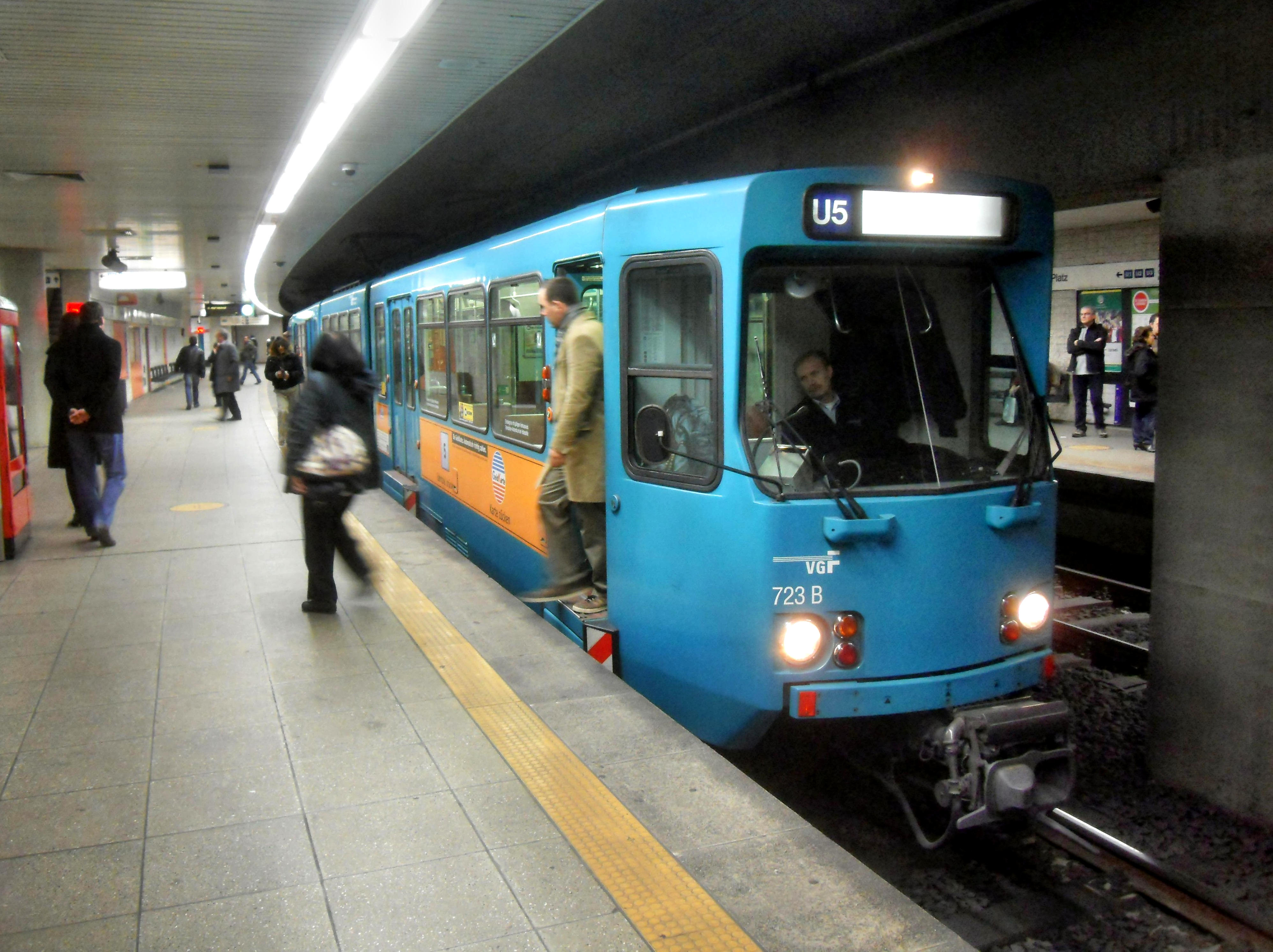 U-Bahn-Wagen des Types Ptb der U-Bahn Frankfurt am Main im U-Bahnhof Willy-Brandt-Platz in der D-Ebene auf der Linie U 5 in Hessen (Deutschland)